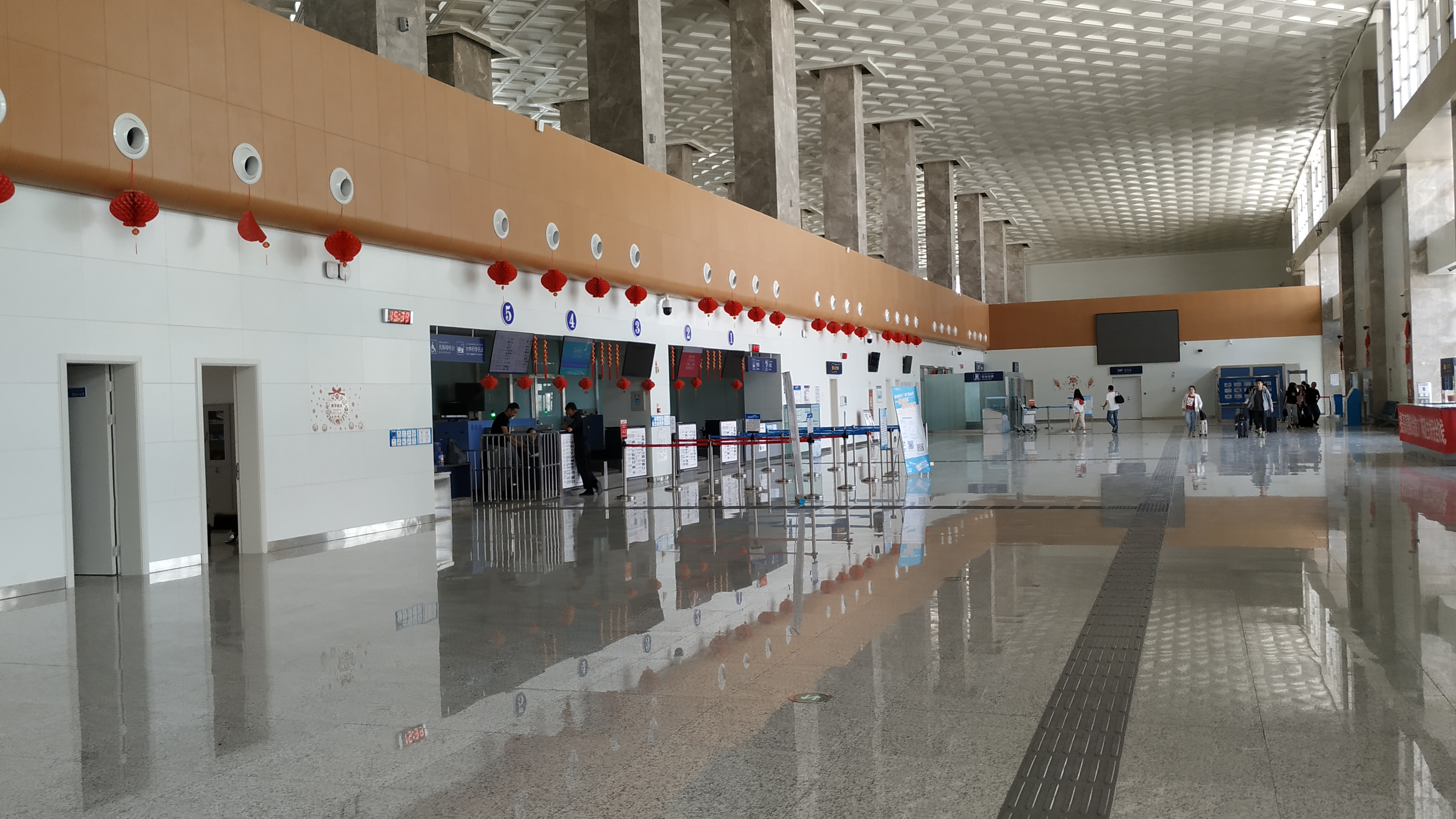 中文（中国大陆）: 若羌楼兰机场航站楼